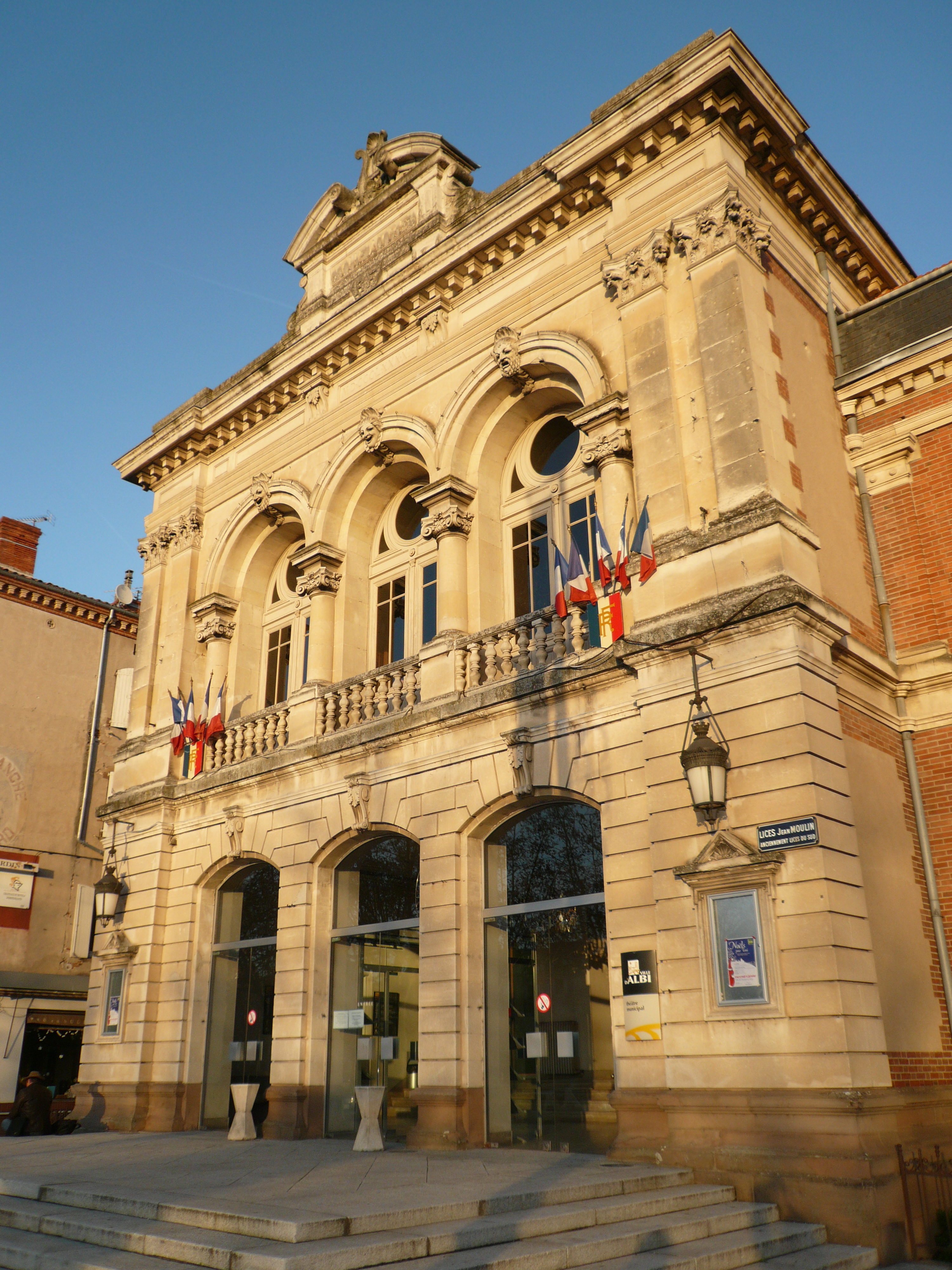 Théatre d'Albi (Tarn) France